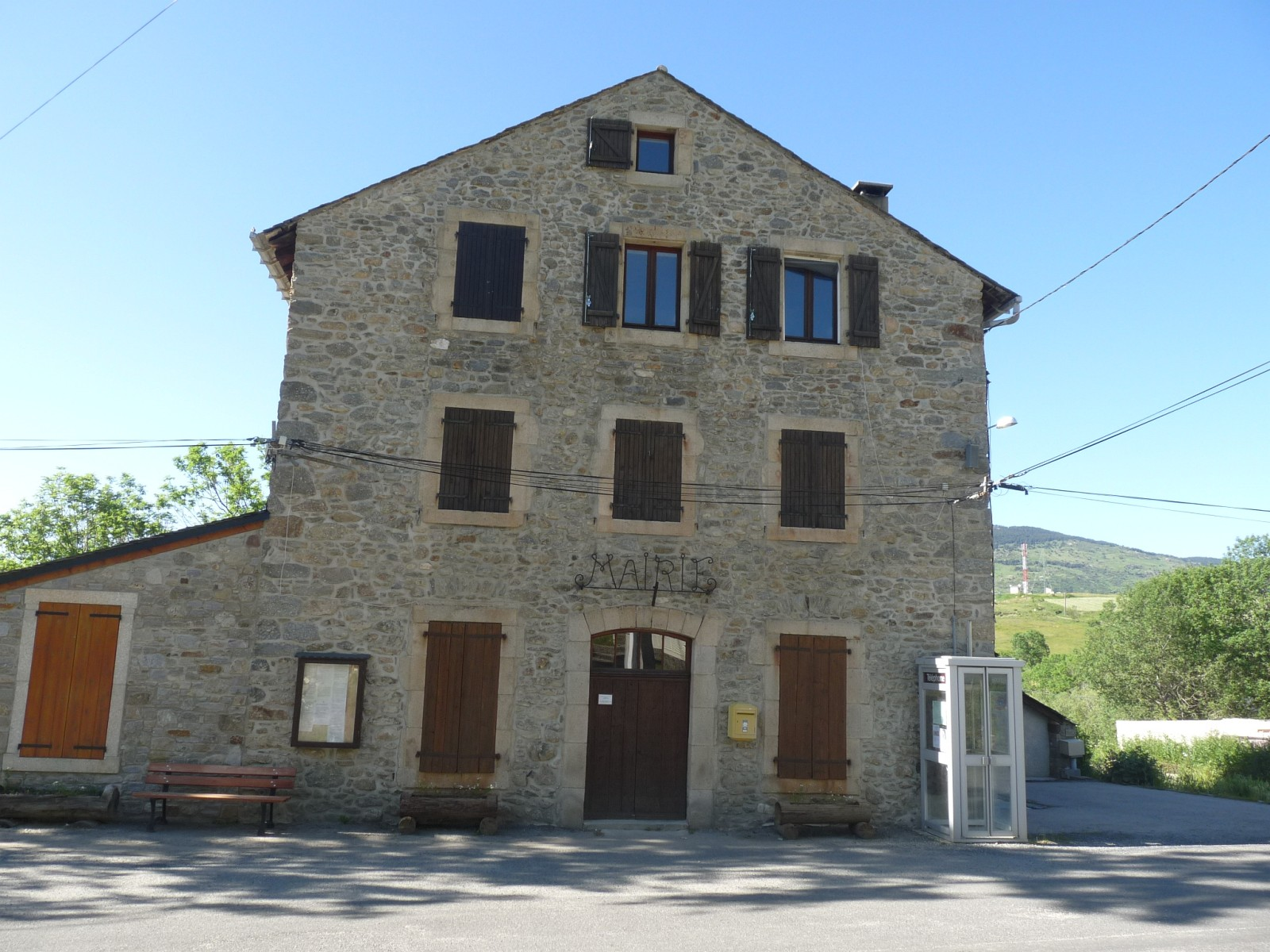 Mairie de Planès, Pyrénées-Orientales, France